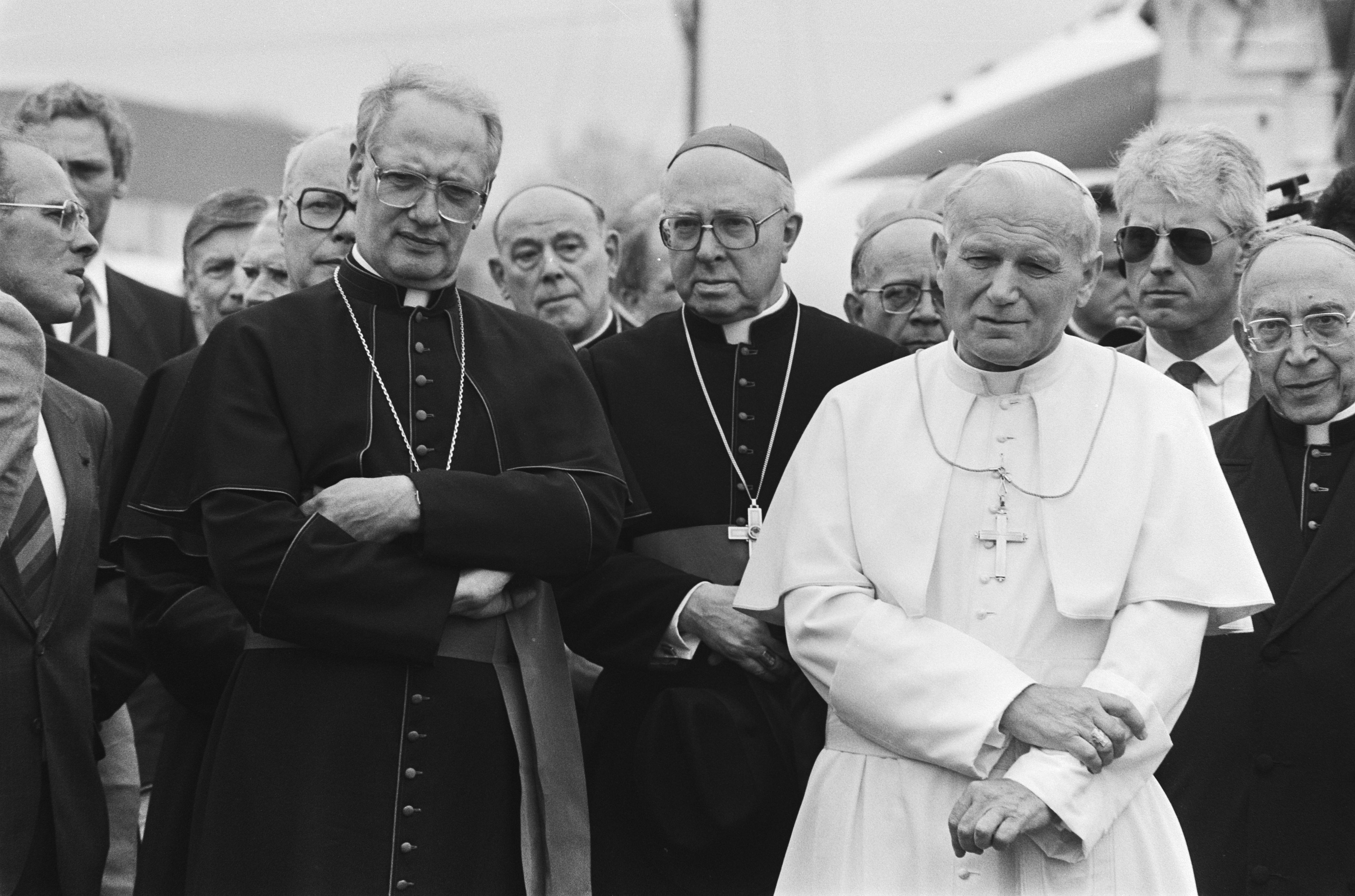 Collectie / Archief : Fotocollectie Anefo Reportage / Serie : [ onbekend ] Beschrijving : Bezoek Paus Johannes Paulus II aan Nederland; de Paus met kardinalen Simonis (l) en Willebrands (m) op Welschap Datum : 11 mei 1985 Trefwoorden : KARDINALEN, bezoeken, pausen Persoonsnaam : Johannes Paulus II (paus), Simonis, Ad Fotograaf : Croes, Rob C. / Anefo Auteursrechthebbende : Nationaal Archief Materiaalsoort : Negatief (zwart/wit) Nummer archiefinventaris : bekijk toegang 2.24.01.05 Bestanddeelnummer : 933-3249